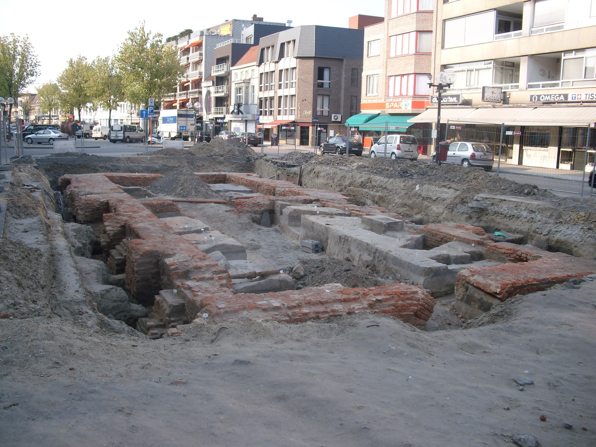 Grondvesten van de oude en in 1792 afgebrande stadshalle - Grote Markt - Deinze - Oost-Vlaanderen - Vlaams Gewest - België